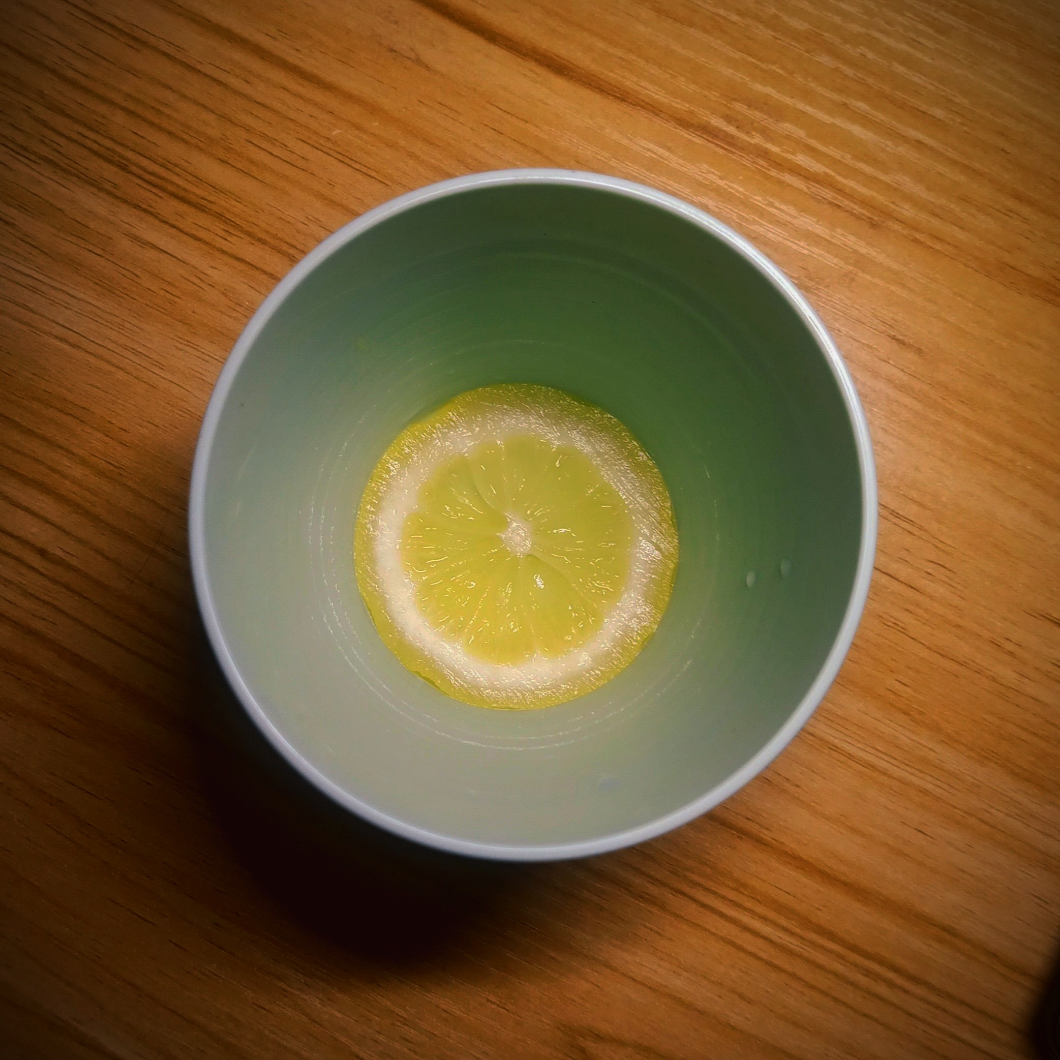 中文（中国大陆）: 一片柠檬的艺术照